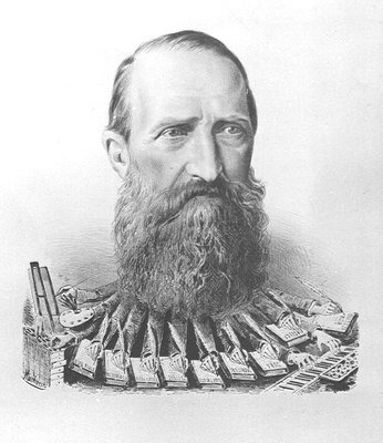 Беларуская (тарашкевіца): Карыкатура на Язэпа Ігнацыя Крашэўскага